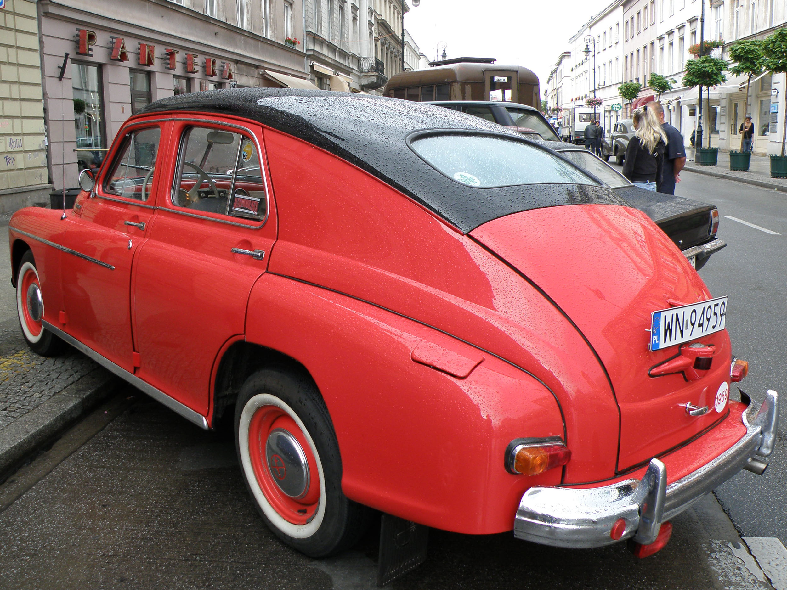 Warszawa, ul. Nowy Świat, II Rajd Pojazdów Zabytkowych "Stare jak nowe" 2009. FSO Warszawa.